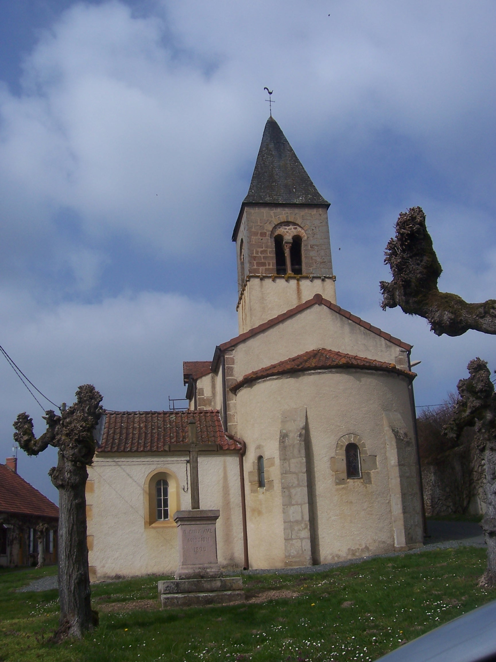 Eglise de Sainte-Radégonde